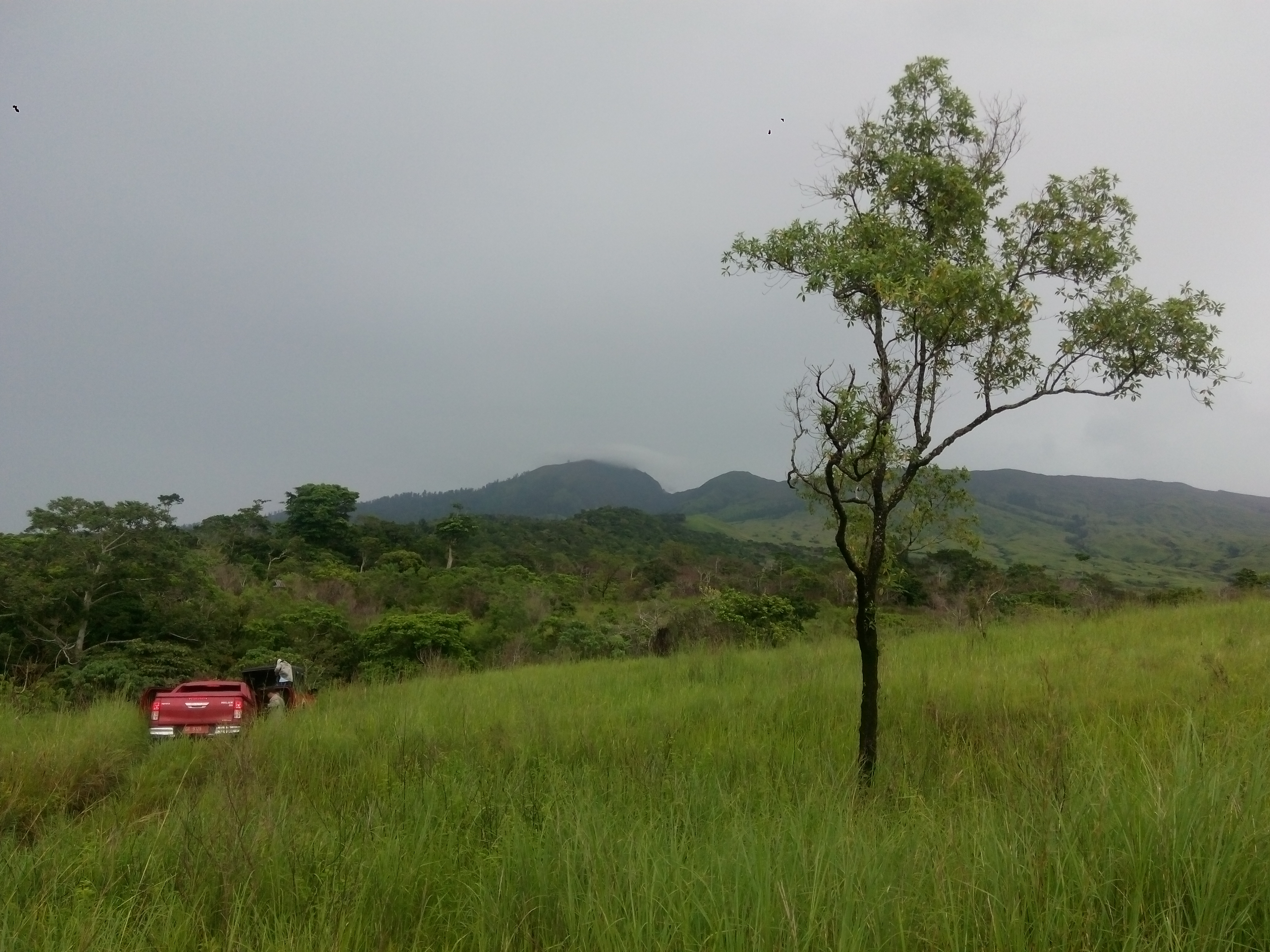 Salah satu jalur pendakian Taman Nasional Gunung Tambora. Dari wilayah Doro Ncanga, Kec. Pekat, Kab. Dompu, Prov. Nusa Tenggara Barat. Melalui jalur ini bisa menggunakan kendaraan roda 2 ataupun roda 4 sampai dengan pos pendakian terakhir tepat di bawah puncak Gunung Tambora.